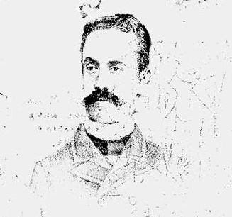 Dr. Candido Benício da Silva Moreira, 1º Secretário do Conselho Municipal